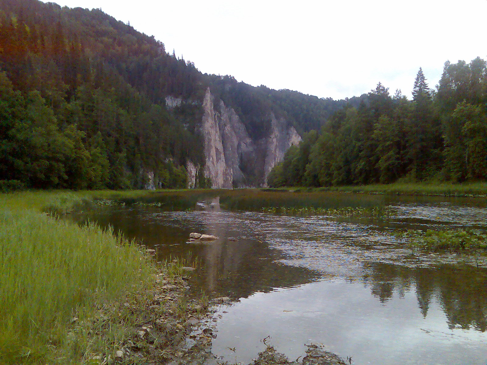 Вид на скалу Мамбет